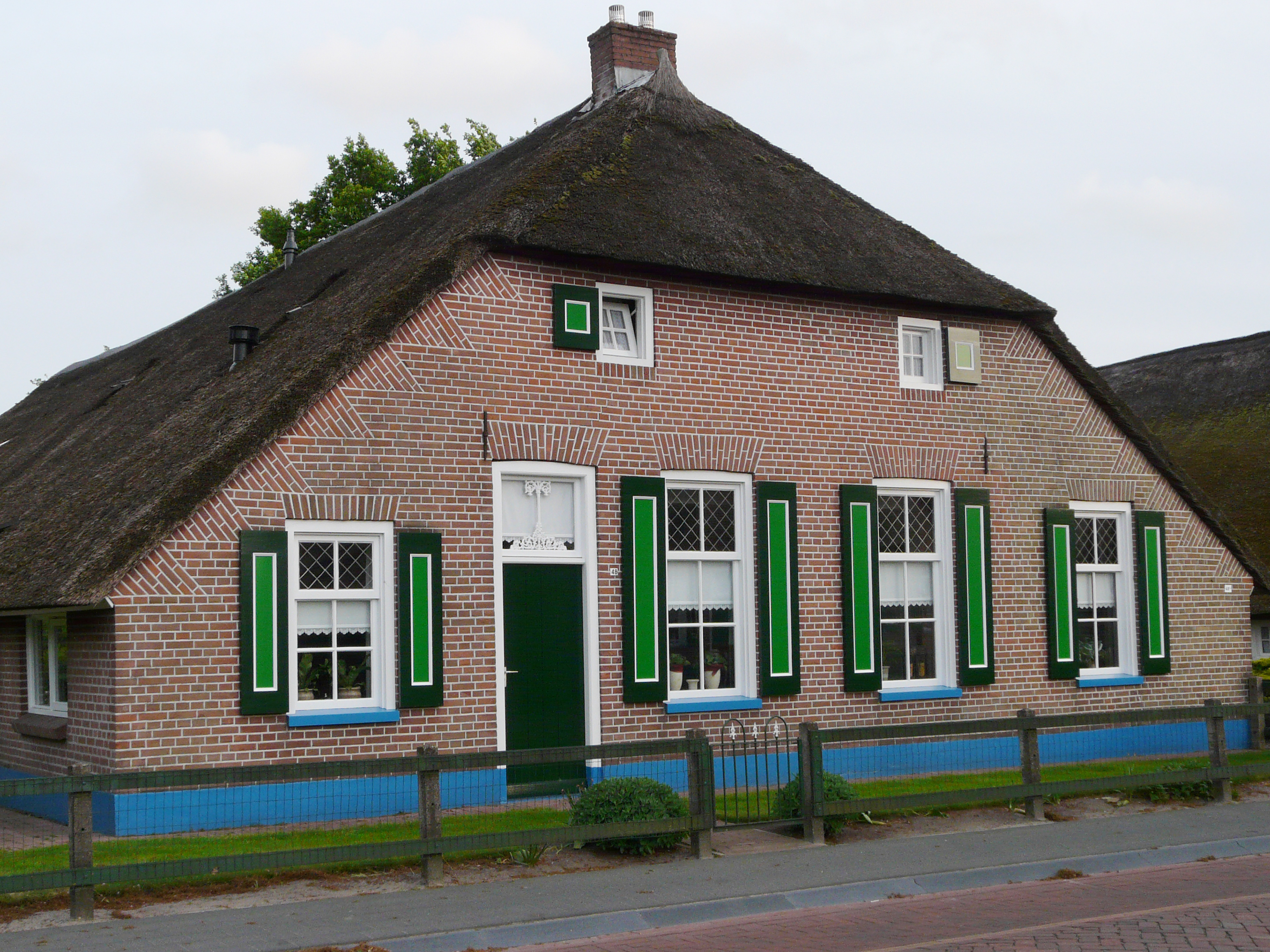 Staphorster farmhouse in authentic colors